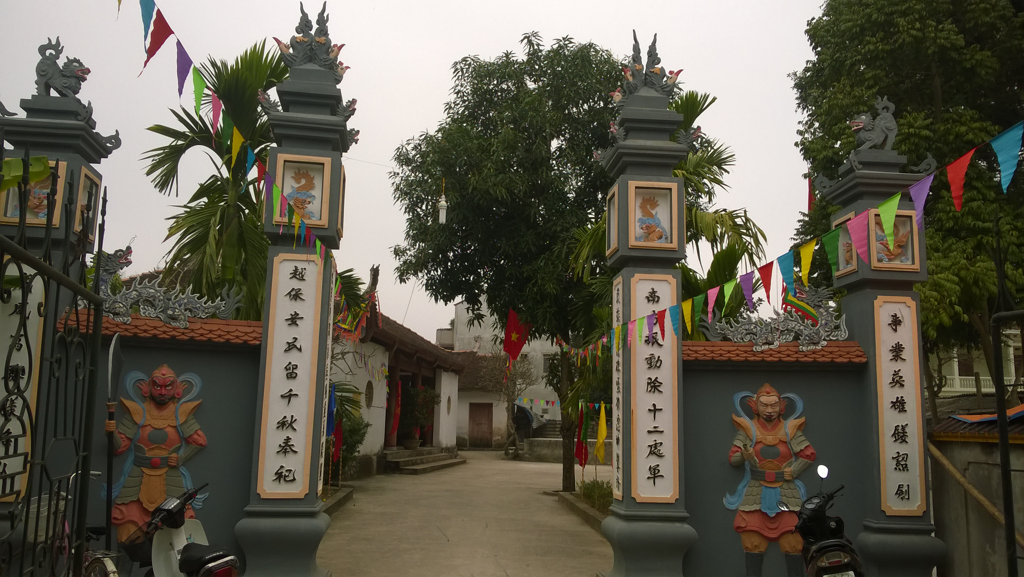 Đền thờ Đinh Tiên Hoàng Đế ở thôn Vài, xã Hợp Thanh, Mỹ Đức, Hà Nội - Nơi Đinh Bộ Lĩnh tuyển quân và xây dựng căn cứ dẹp loạn 12 sứ quân